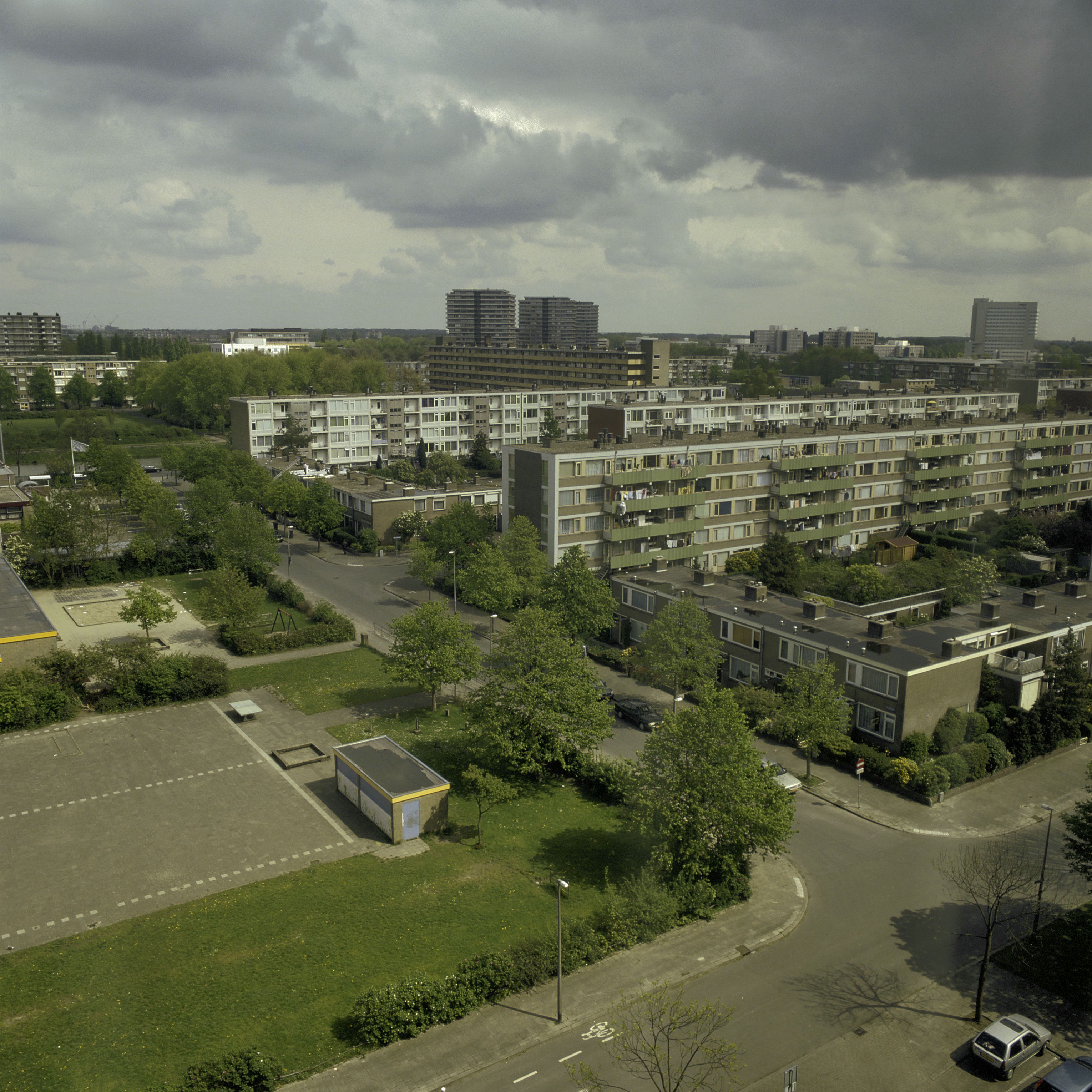 Woonwijk: Kanaleneiland: Overzicht van Kanaleneiland, gezien uit flat Zuid (opmerking: Gefotografeerd voor Toonbeelden van de Wederopbouw)